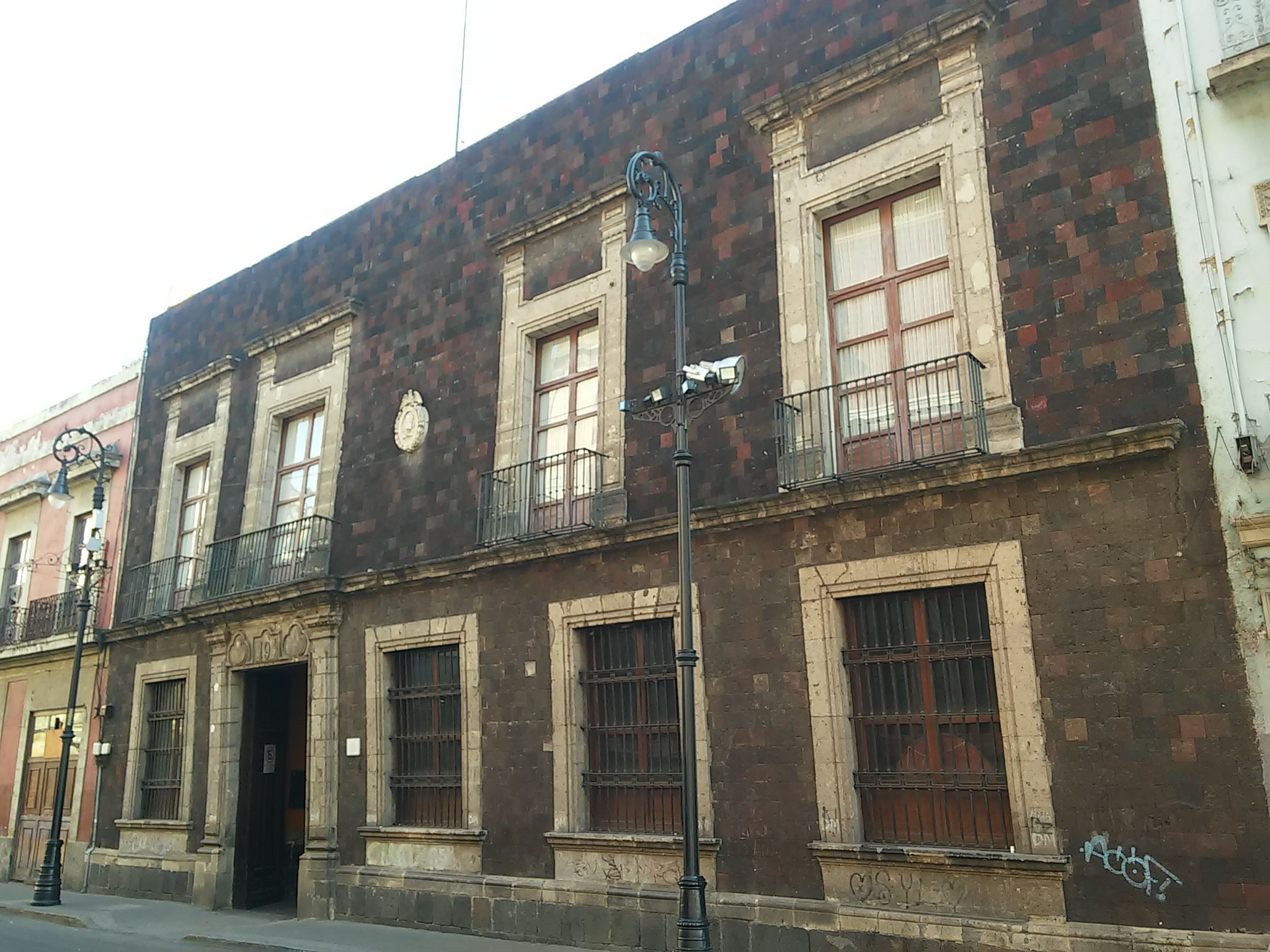 Fachada del edificio sede de la sociedad Mexicana de Geografía y Estadística